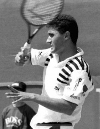 George Cosac in Bucharest